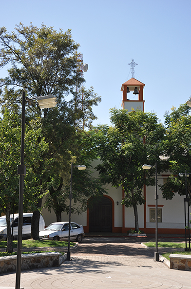 Iglesia